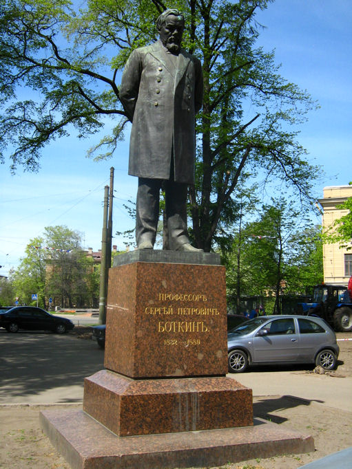 Sergei Botkin's monument